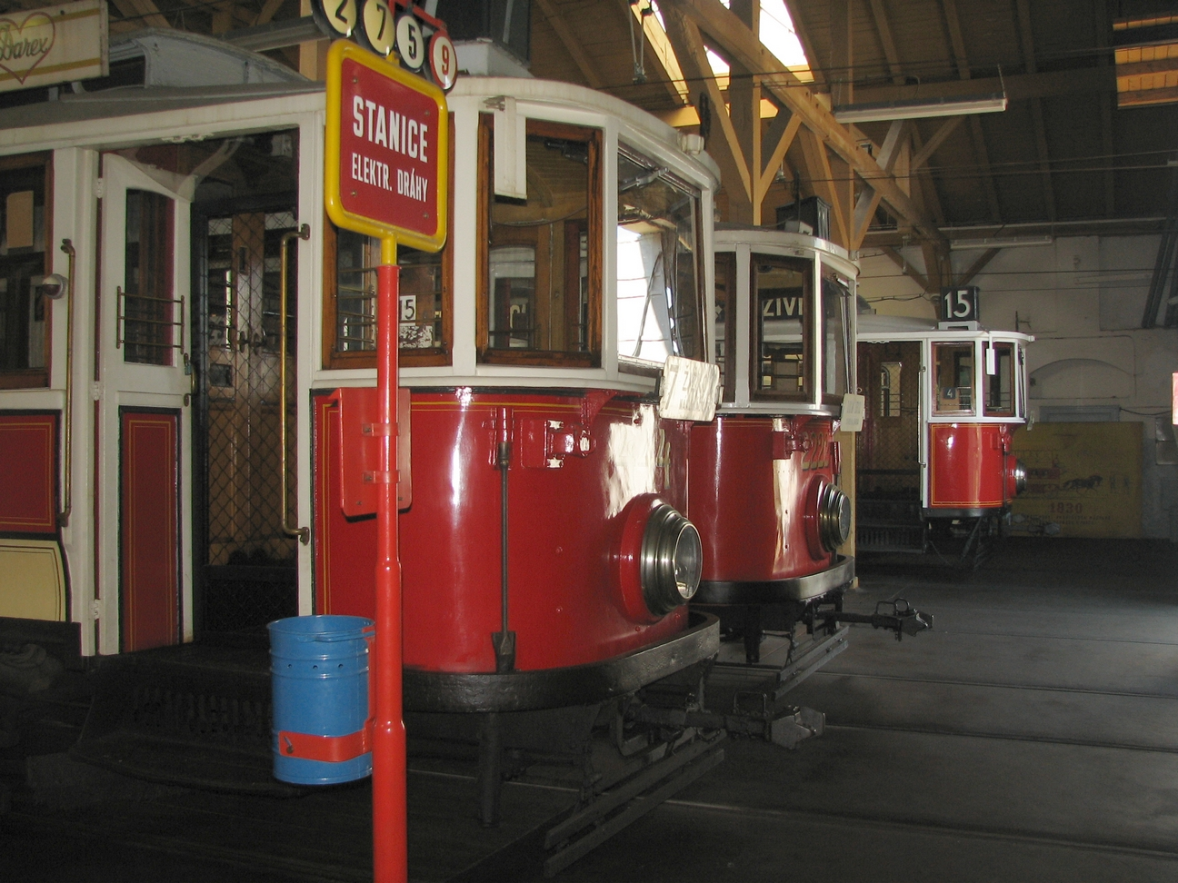 Museum des öffentlichen Personennahverkehrs Prag, historische Straßenbahnen in der Halle